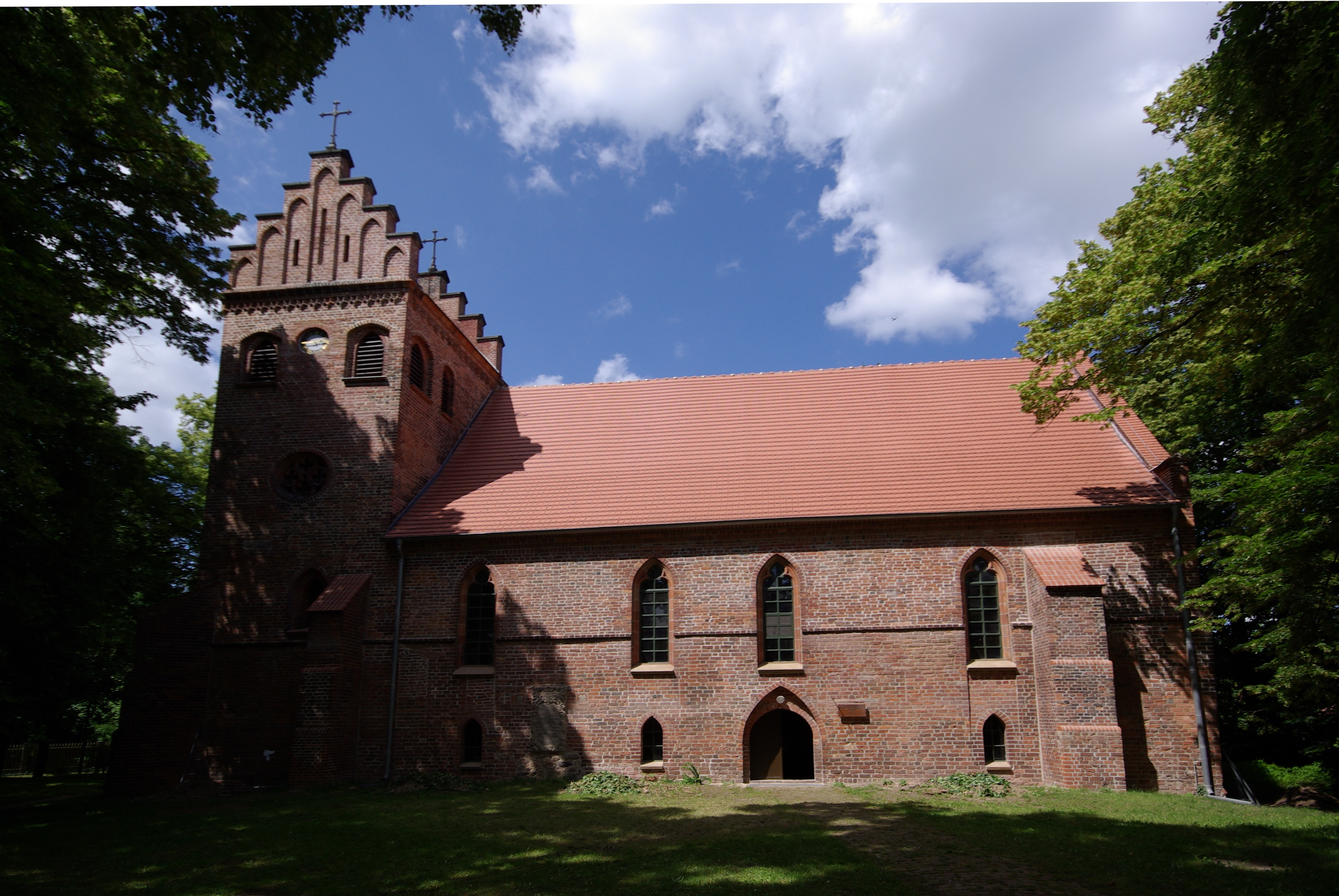 Teupitz in Brandenburg. Die Heilig-Geist-Kirche stammt aus dem Ende des 14. Jahrhunderts. Die Kirche steht unter Denkmalschutz.